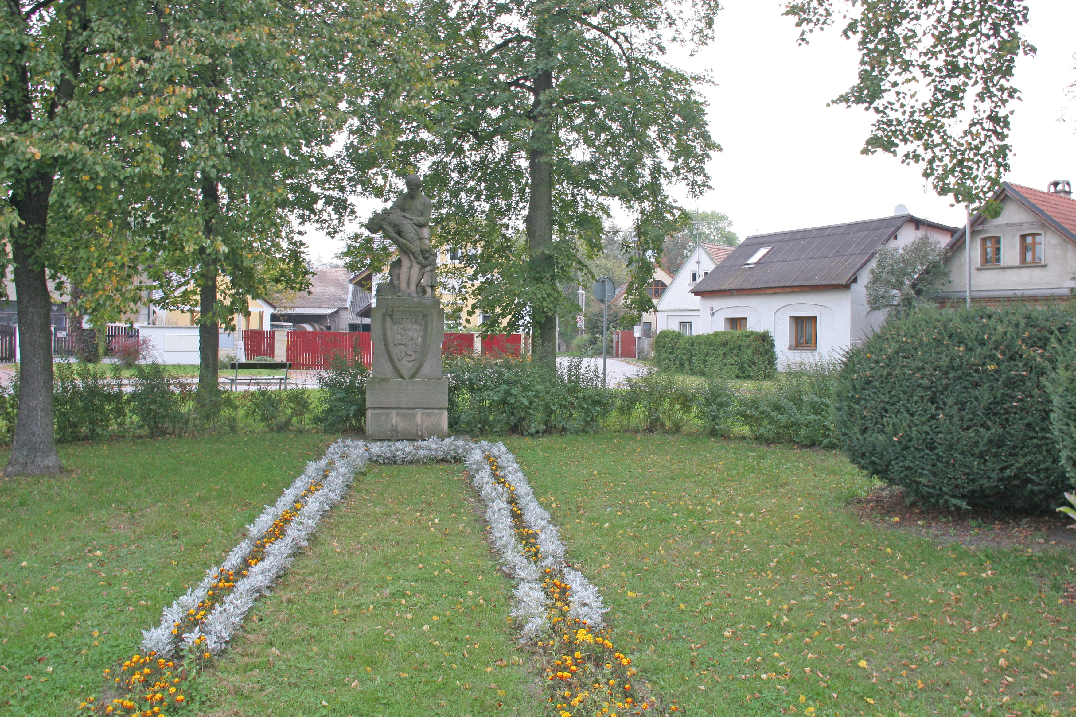 Malšova Lhota pomník padlých